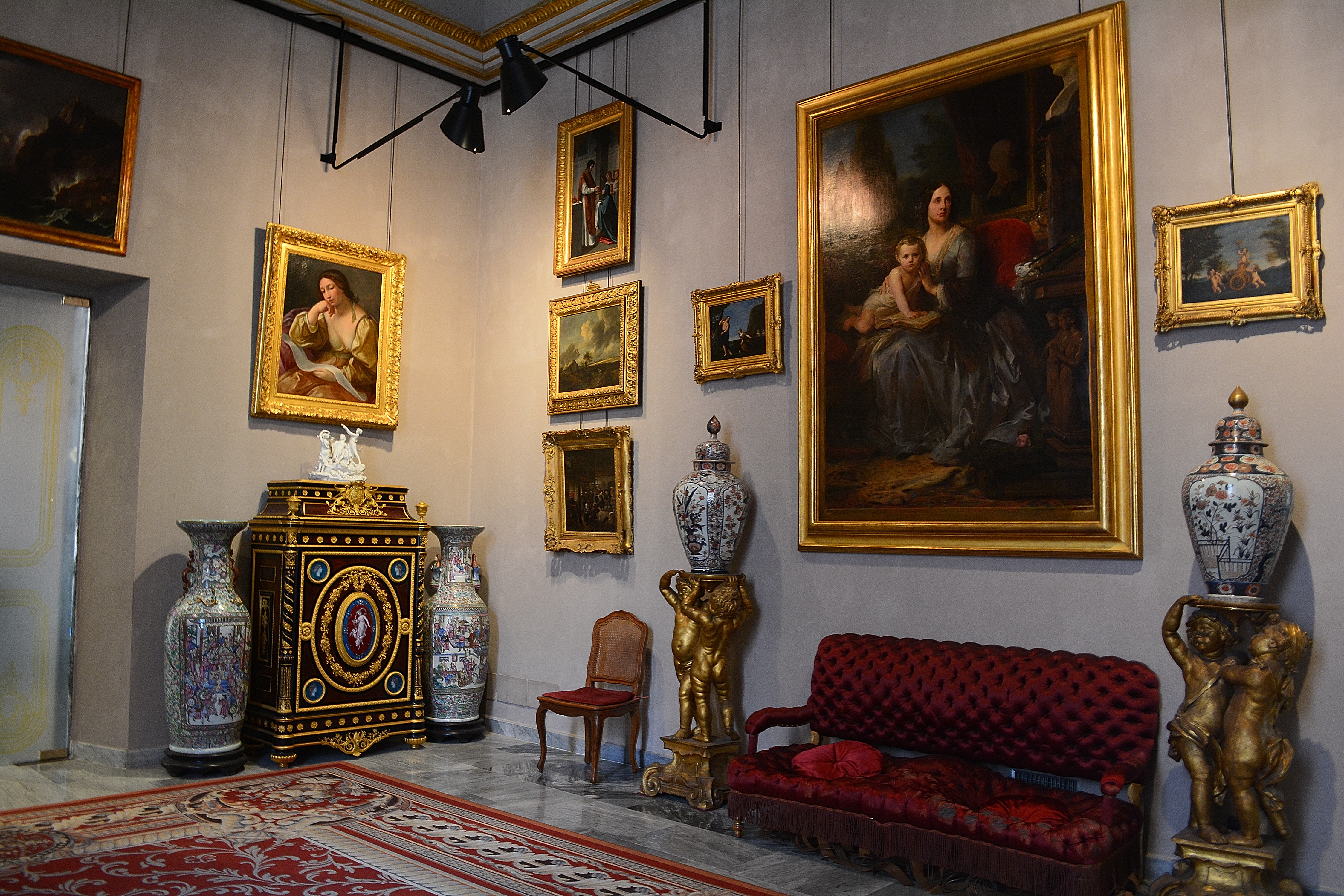 Palazzo Rosso - Musei di Strada Nuova This is a photo of a monument which is part of cultural heritage of Italy.